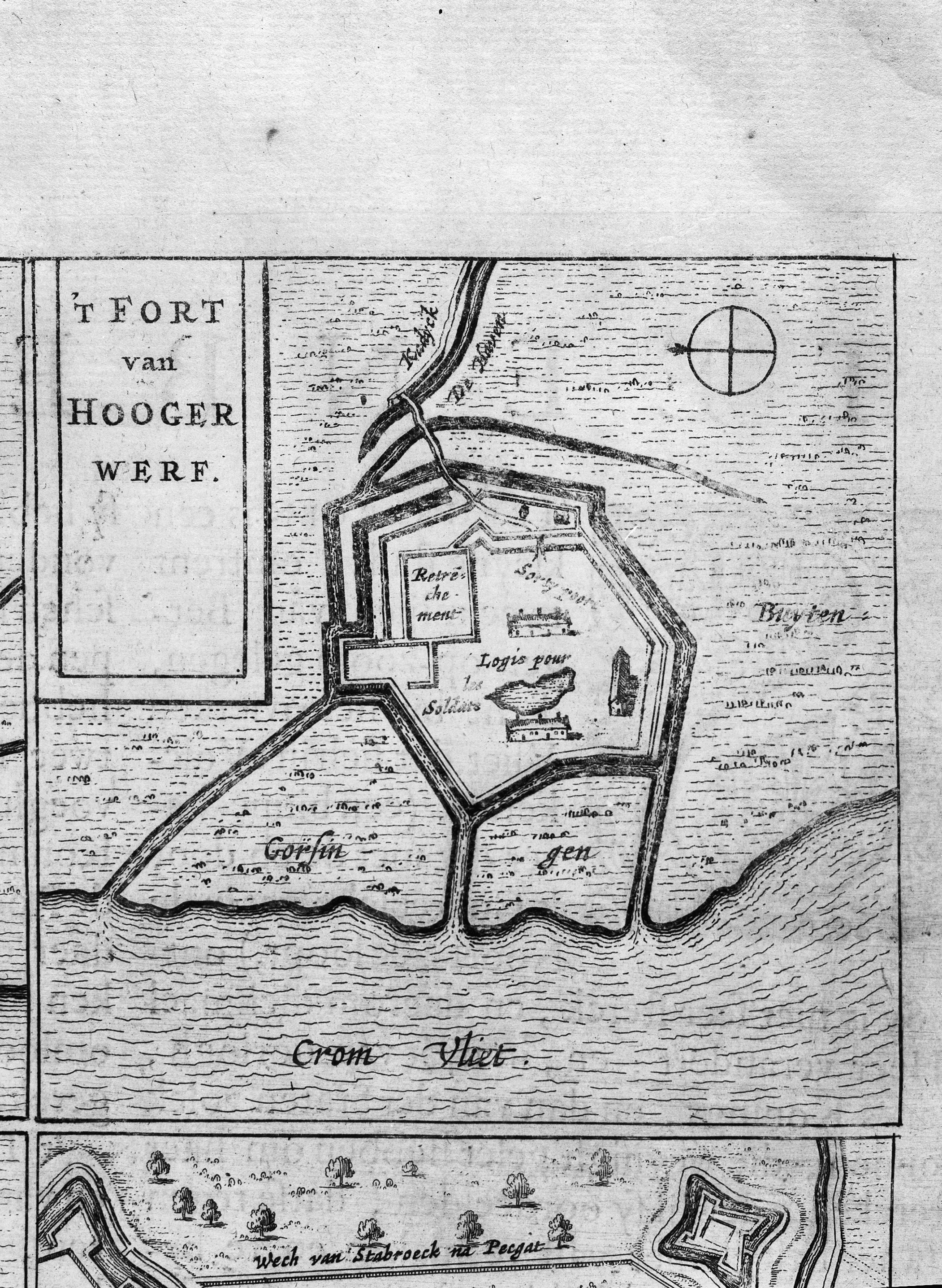 't fort van Hoogerwerf, reproductie uit album Rijksdienst voor de Monumenten Zorg te Zeist